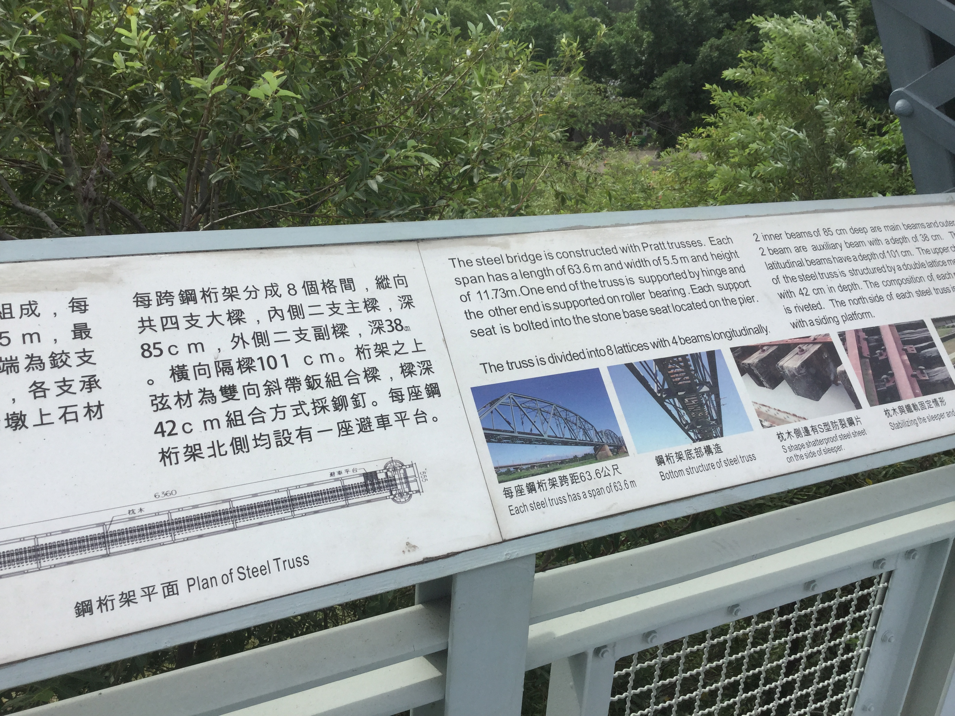 高屏溪舊鐵橋中文和英文說明